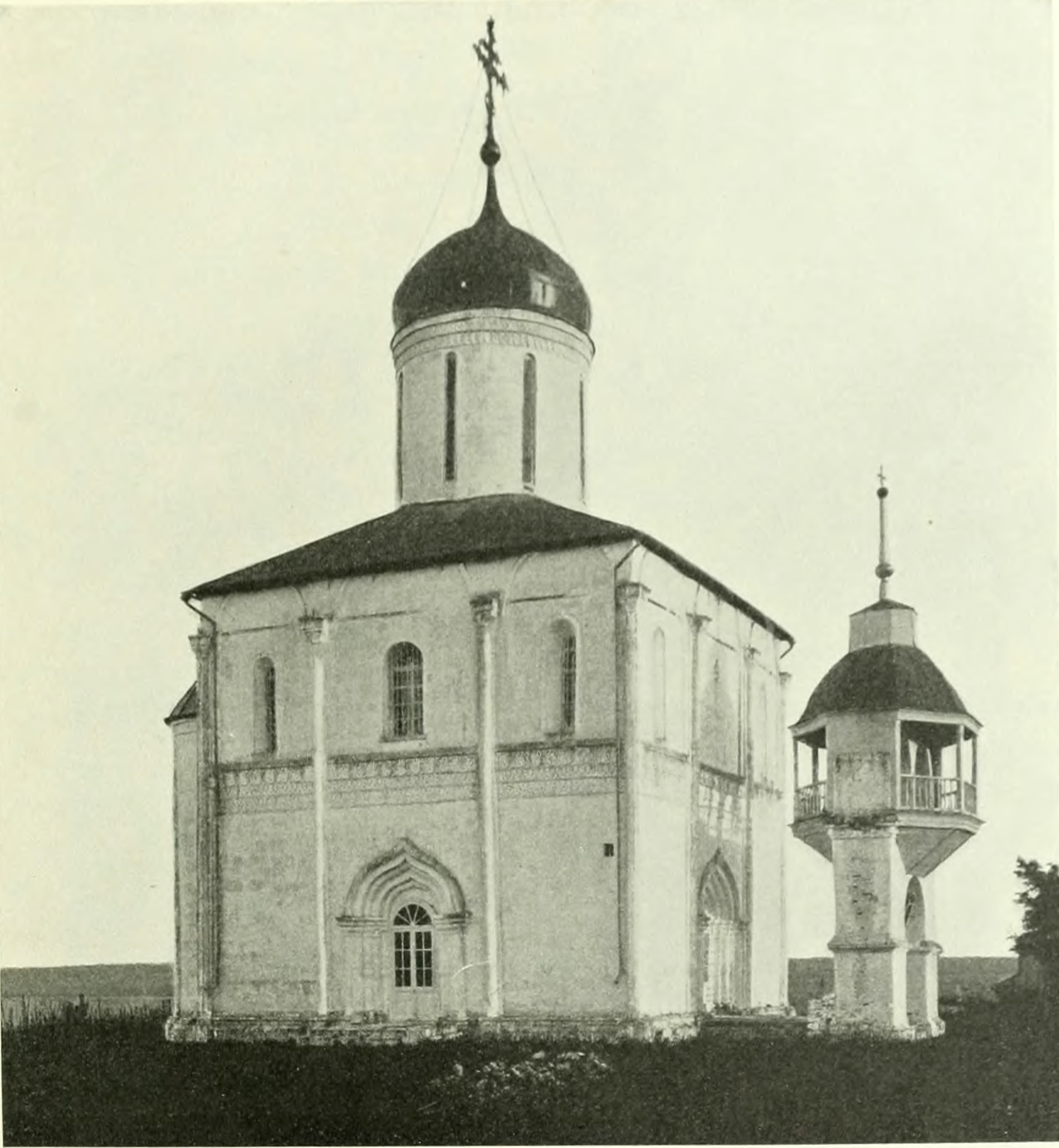 Успенский собор в Звенигороде